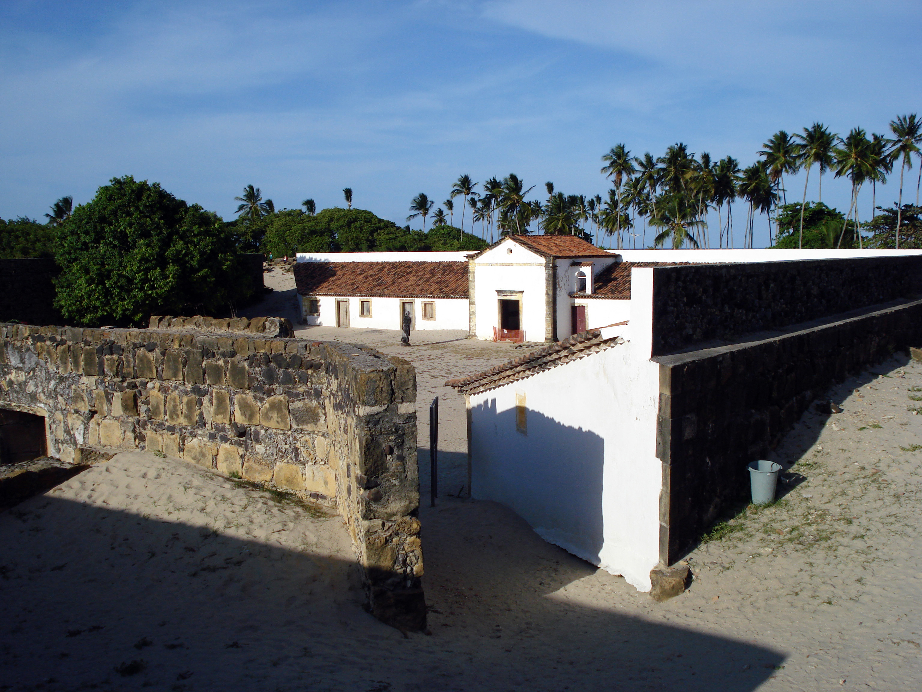 Fort Orange, Itamaracá Island, Brazil Het Fort Orange is gebouwd door de Nederlanders, toen Prins Maurits het Noordoosten van Brazilië in handen had. Hierin sloten wij de Portugezen op die zich niet wilden bekeren tot het protestantse geloof. Groot gelijk! ;-)